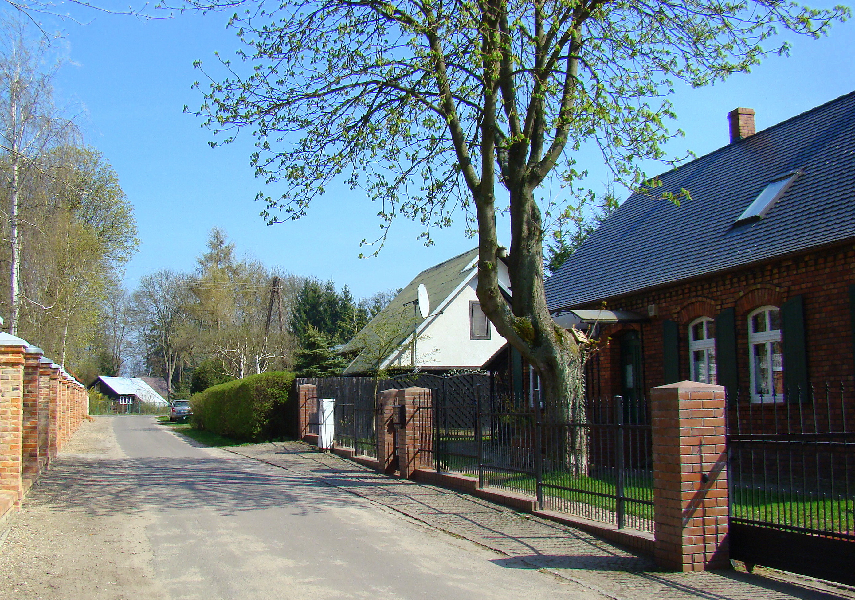 Myślibórz Wielki, część zachodnia (Gmina Nowe Warpno, Województwo zachodniopomorskie), Polska